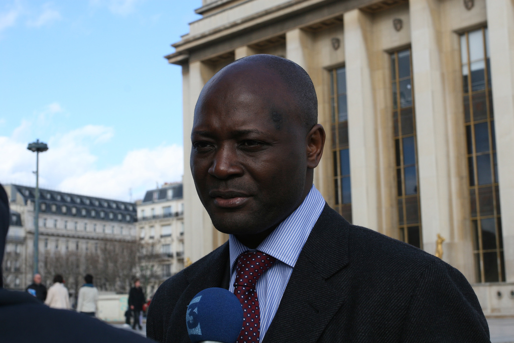 Bruno Ben MOUBAMBA - Déclaration contre la corruption